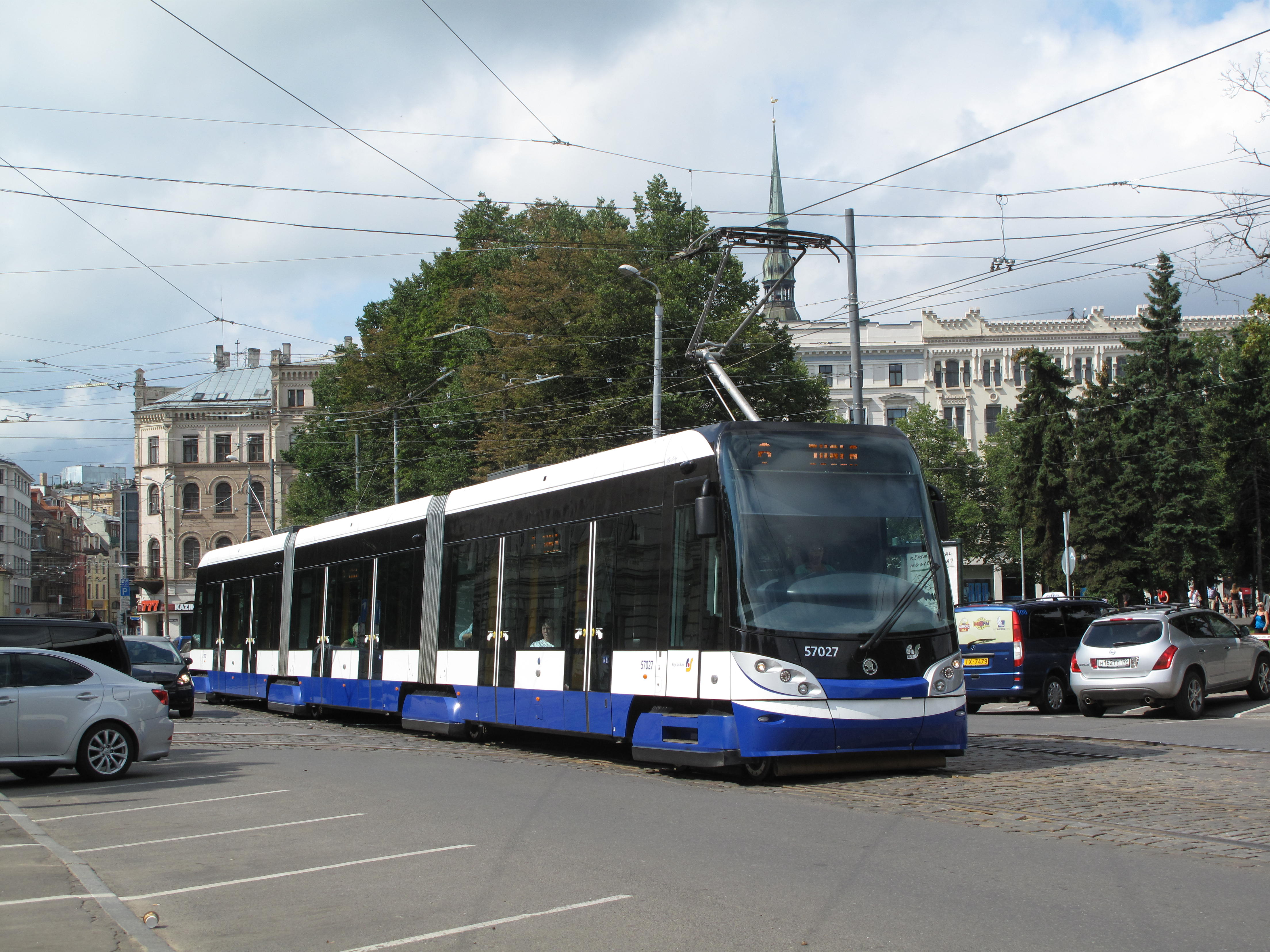 Škoda 15T v Rize